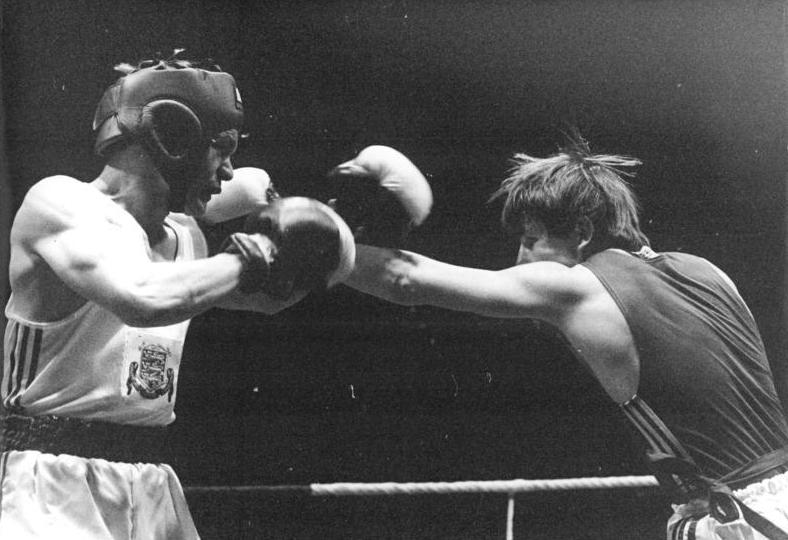 John Lyon, René Breitbarth ADN-ZB Sindermann 26.10.85-ad-Rostock: Boxländerkampf DDR-England-Beim Ländervergleich mit ENgland setzte sich im Fliegengewichtskampf René Breitbarth (DDR; r.)-Europameister 1985 im Halbfliegengewicht- nach Punkten gegen John Lyon durch.